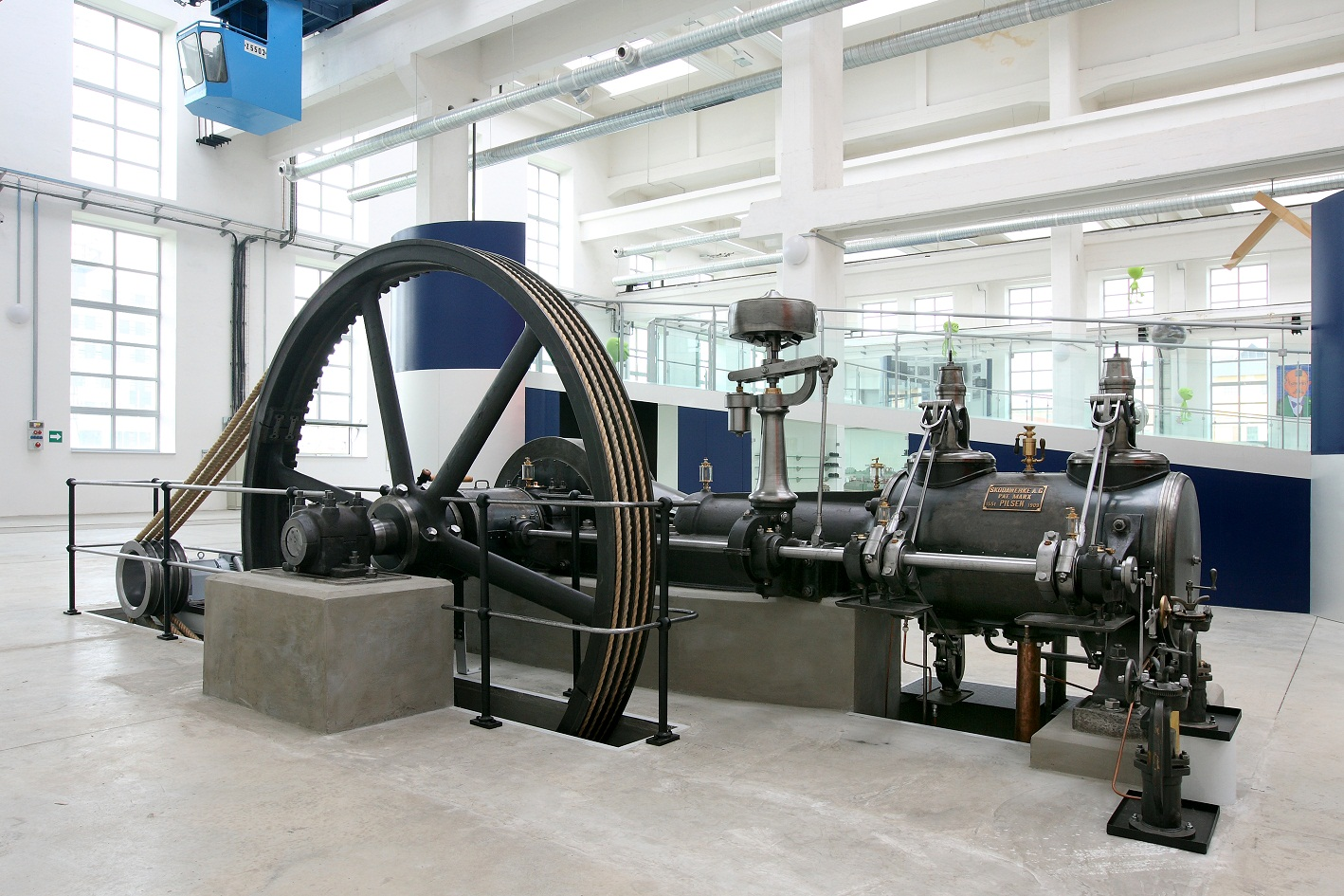 Parní stroj Marx v expozici Techmanie. Boční pohled.